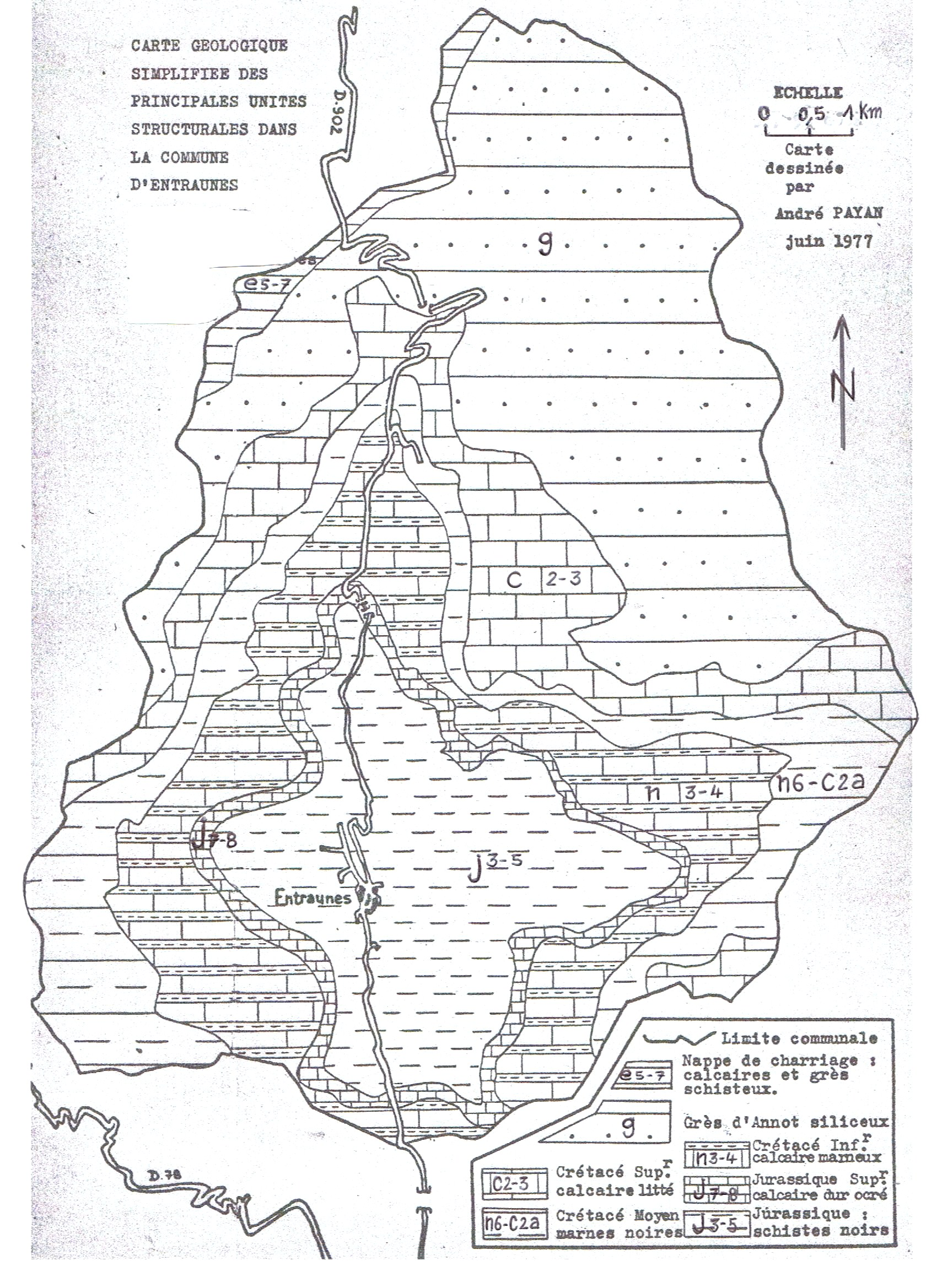 Géologie de la commune d'ENTRAUNES dans le département des Alpes-Maritimes 06 (FRANCE). Carte simplifiée des principales unités structurales dessinée par André Payan (André Payan-Passeron) en juin 1977.